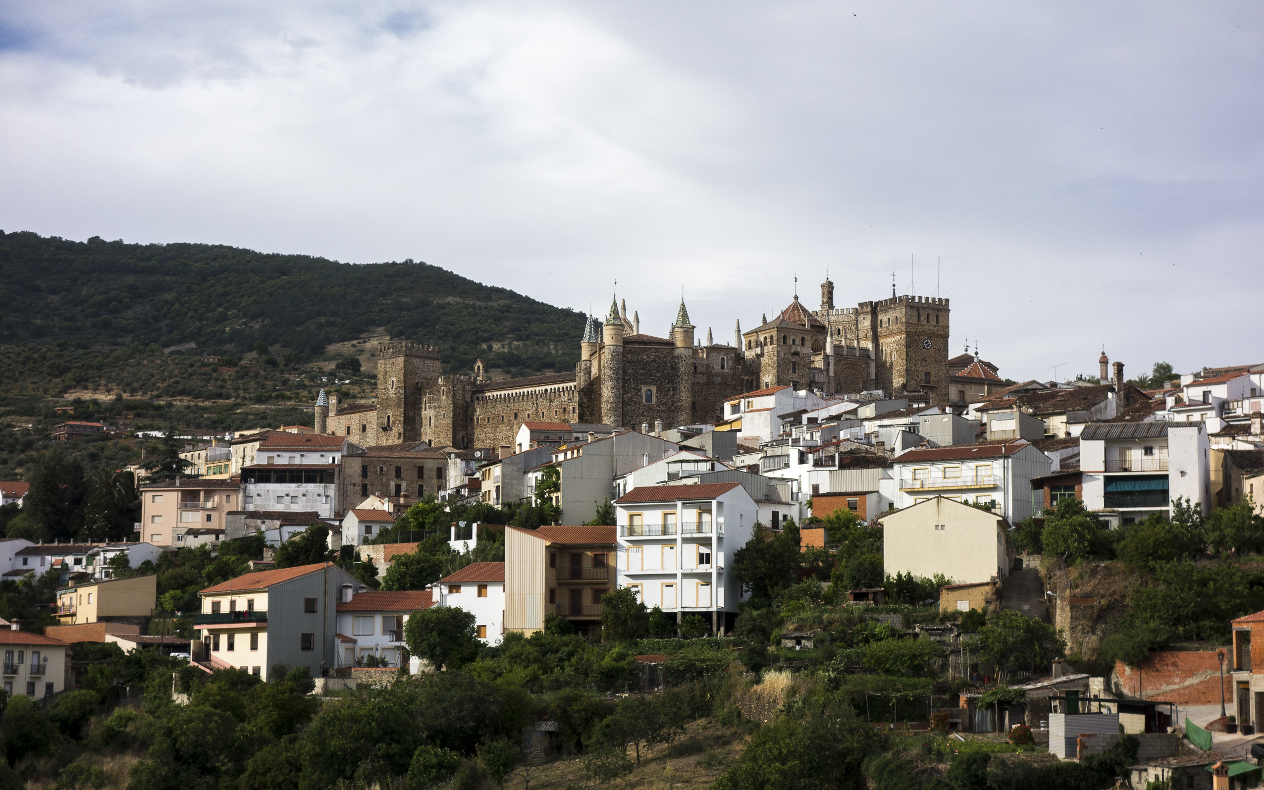 Espagne 2014-04292